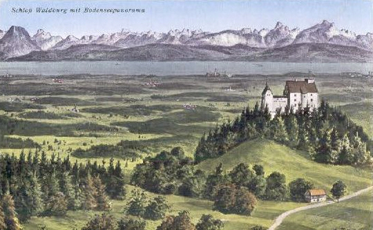 Schloß Waldburg mit Bodenseepanorama